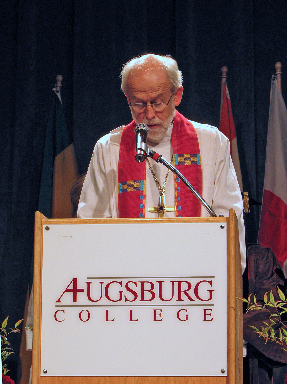 Evangelical Lutheran Church in America, Bishop Mark Hanson Biskup Luterańskiego Kościoła Ewangelickiego w Ameryce, Marek Hanson